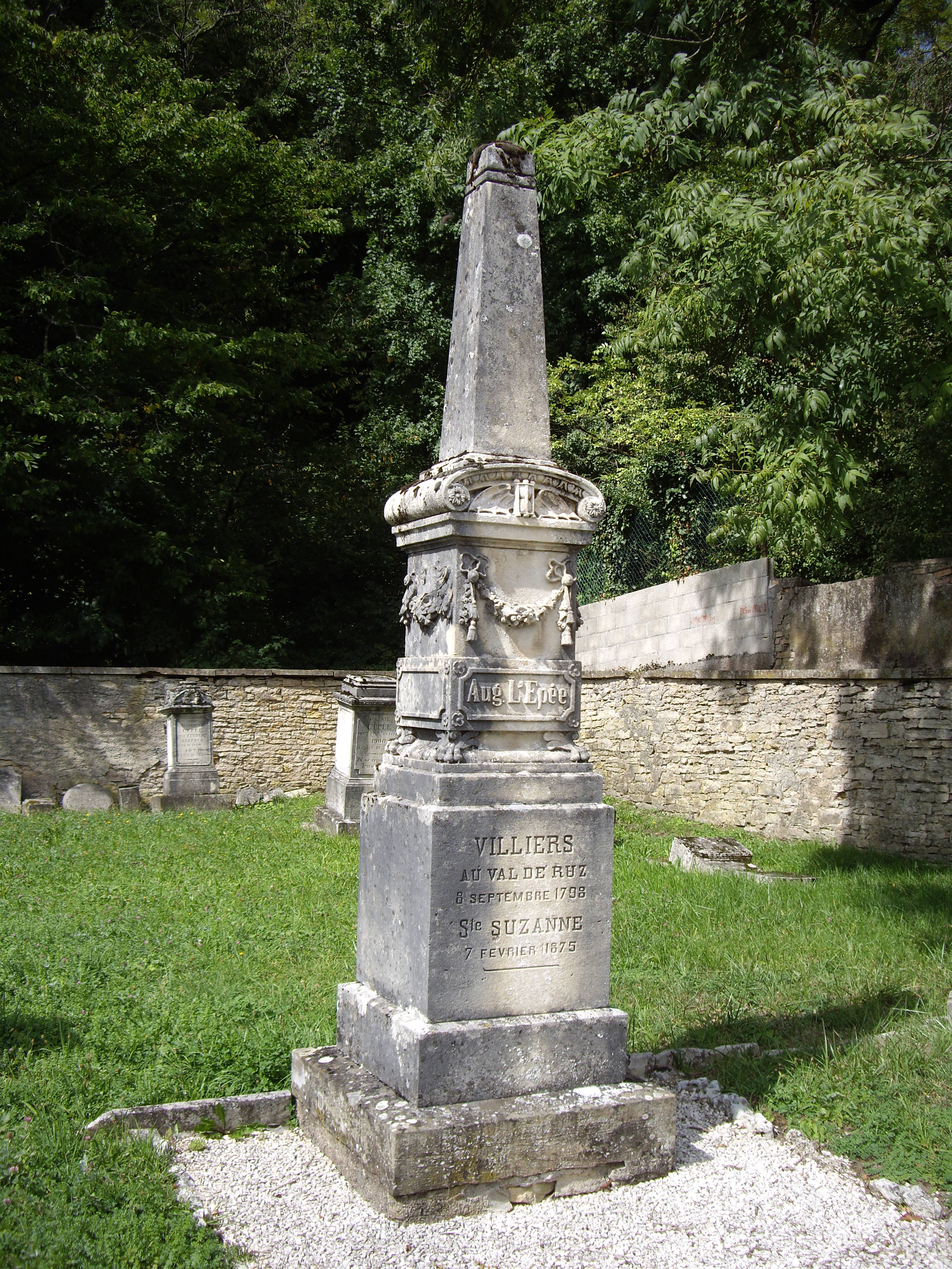 Monument funéraire d'Auguste L'Épée au cimetière L'Épée à Sainte-Suzanne